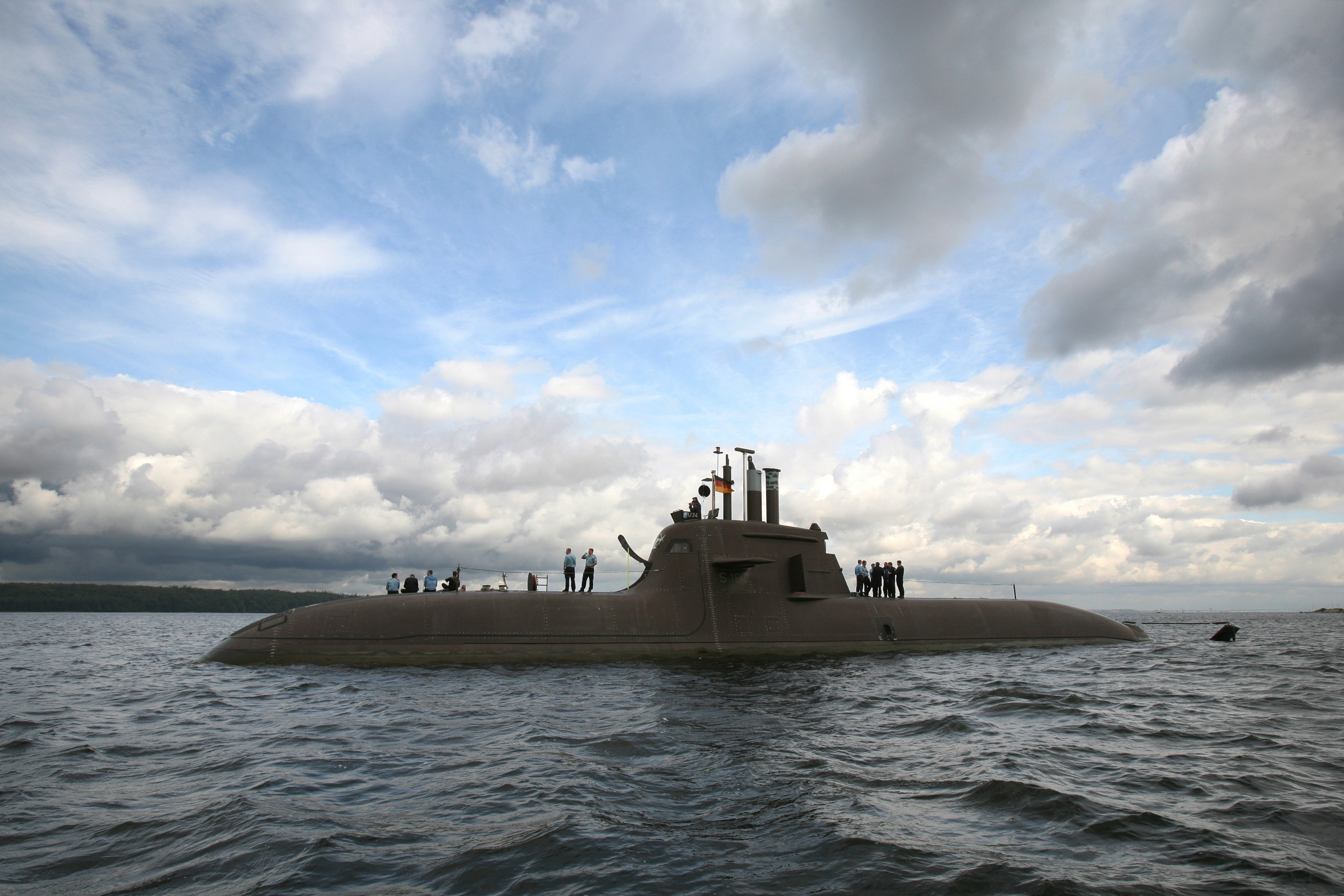 Das Unterseeboot U 34 der Uboot Klasse 212 A in der Flensburger Förde. ©Bundeswehr/Schönbrodt